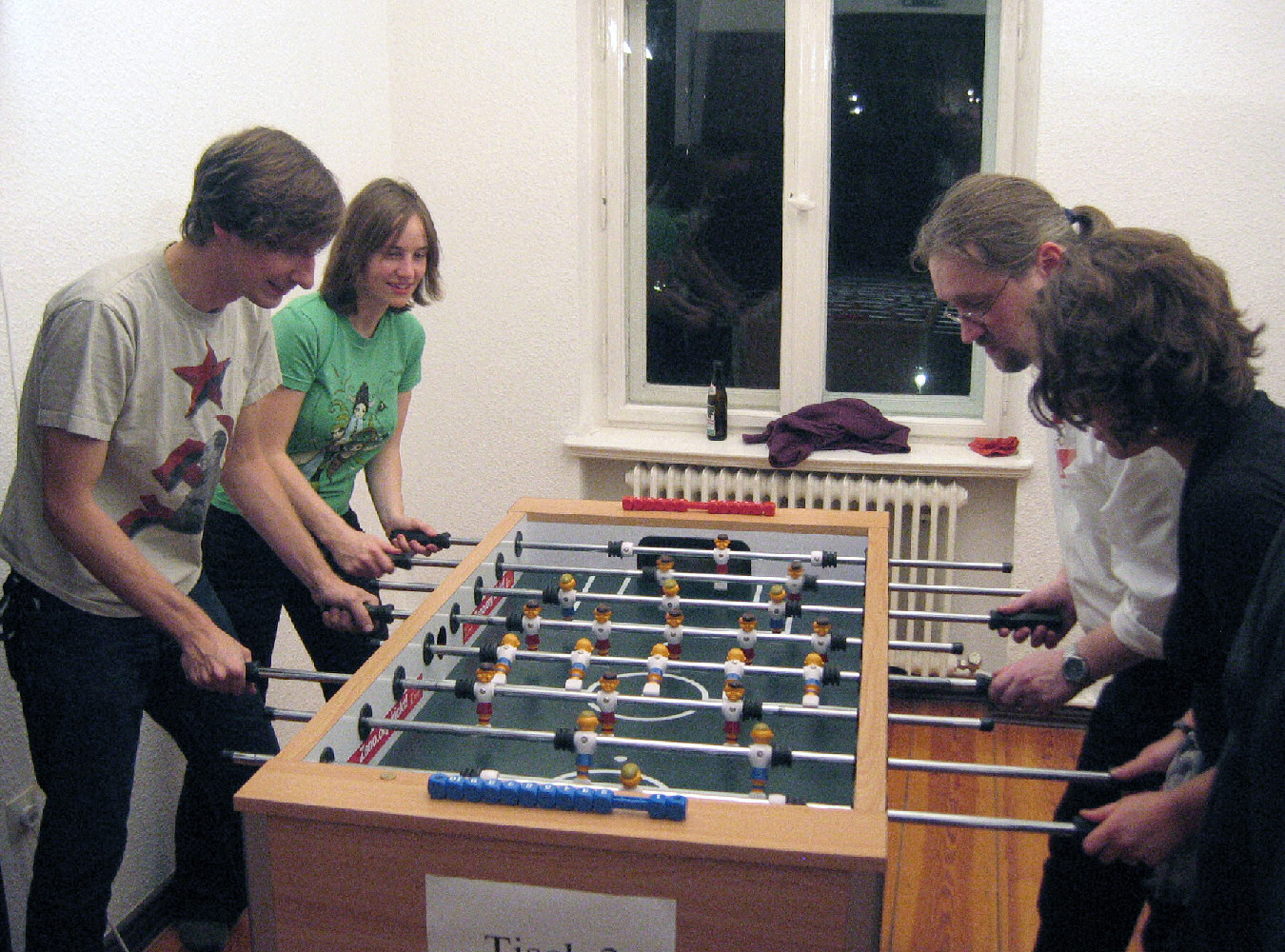 Directmedia / Party